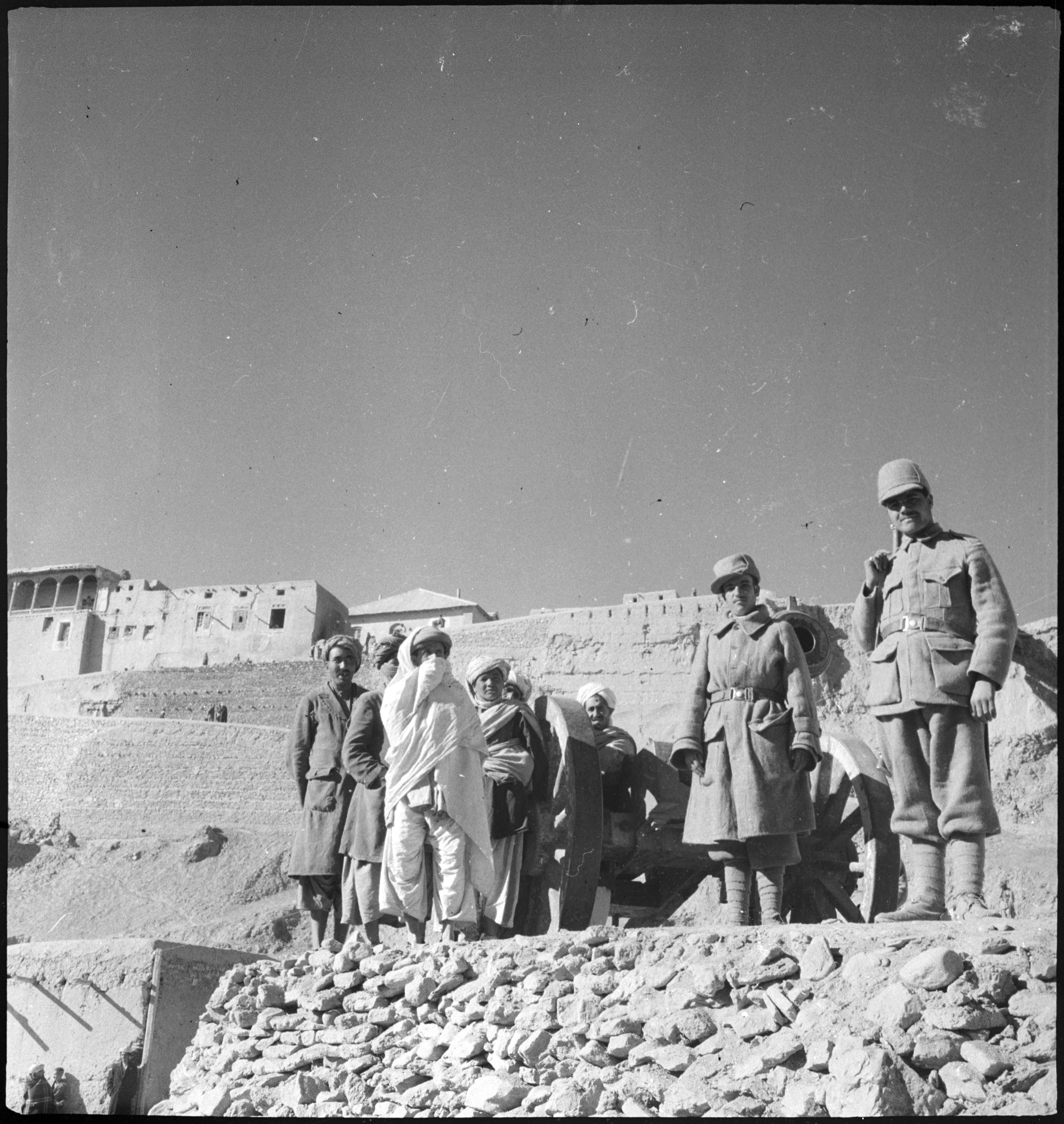 Afghanistan, Ghazni (Ghazna): Menschen; Männer, davon zwei in Uniform, neben einer Kanone, im Hintergrund die Zitadelle